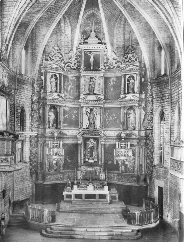 Fotografia de l'interior de l'església abans de ser destruida al 1936